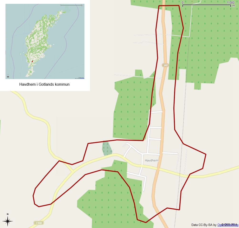 Tätorten Havdhems gränser 1990 enligt Atlas över rikets indelningar 1992.